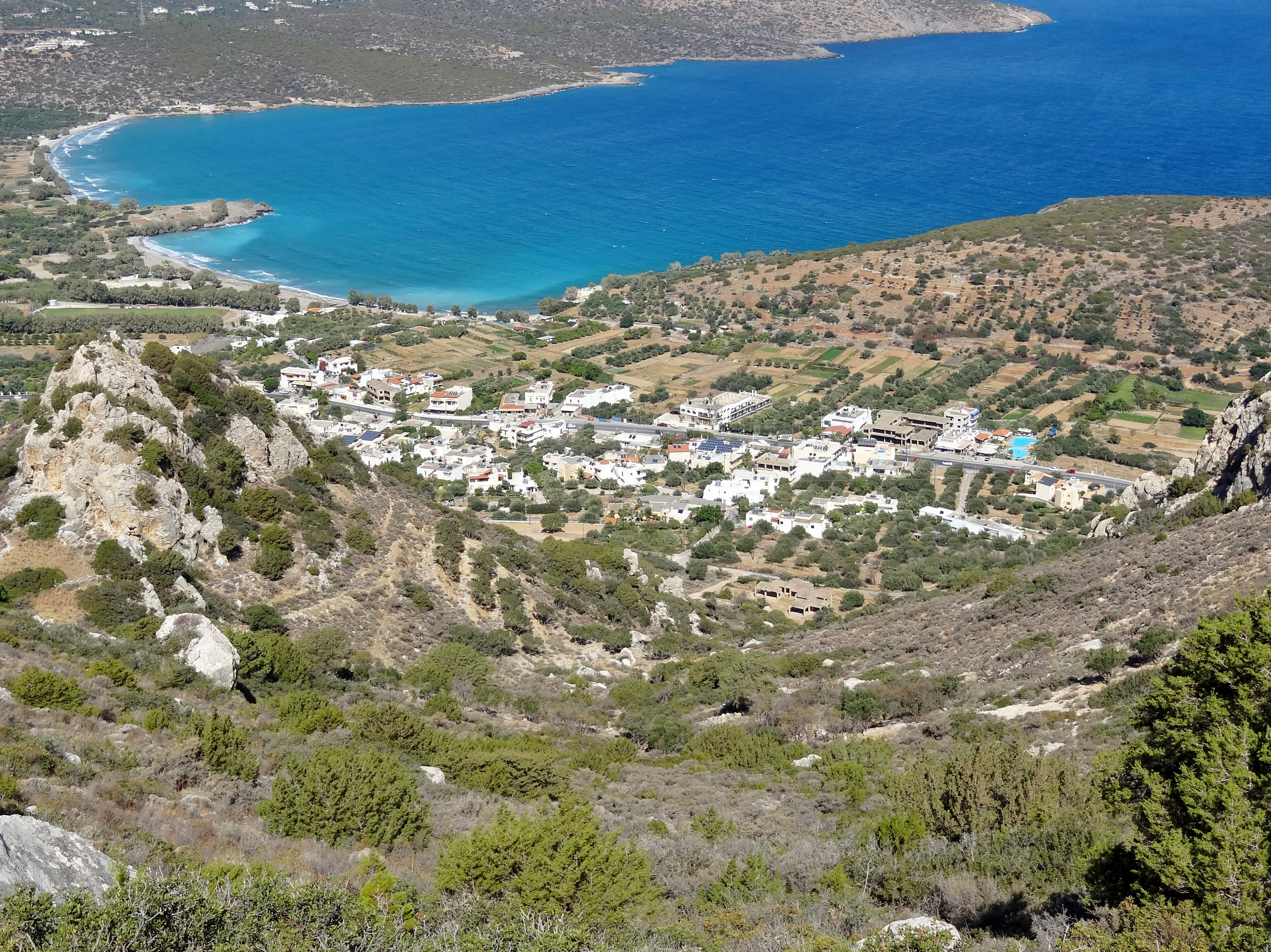 Blick auf Istro bei Kalo Chorio, Gemeinde Agios Nikolaos, Kreta, Griechenland